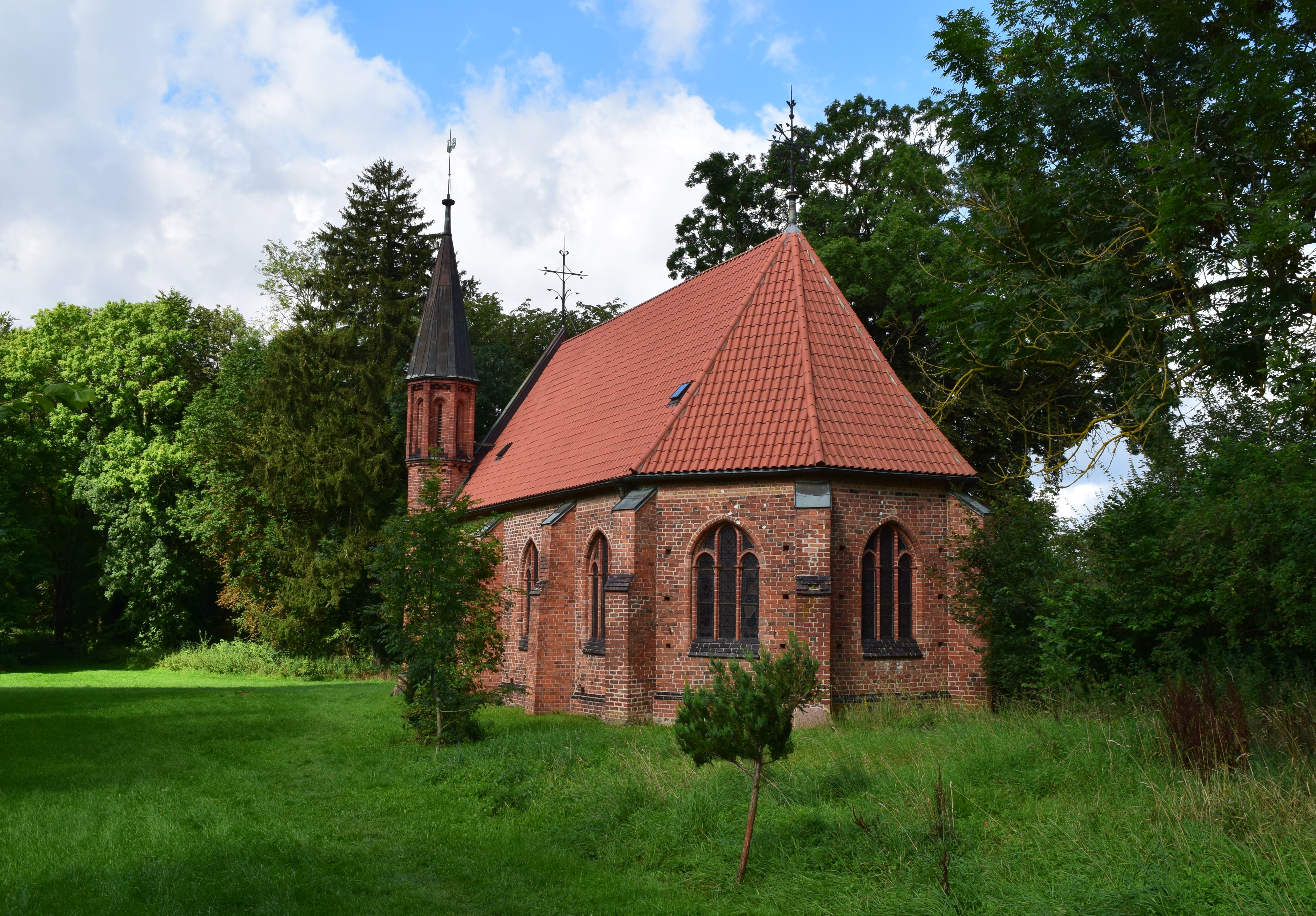 Kapelle Althof vom Feld aus